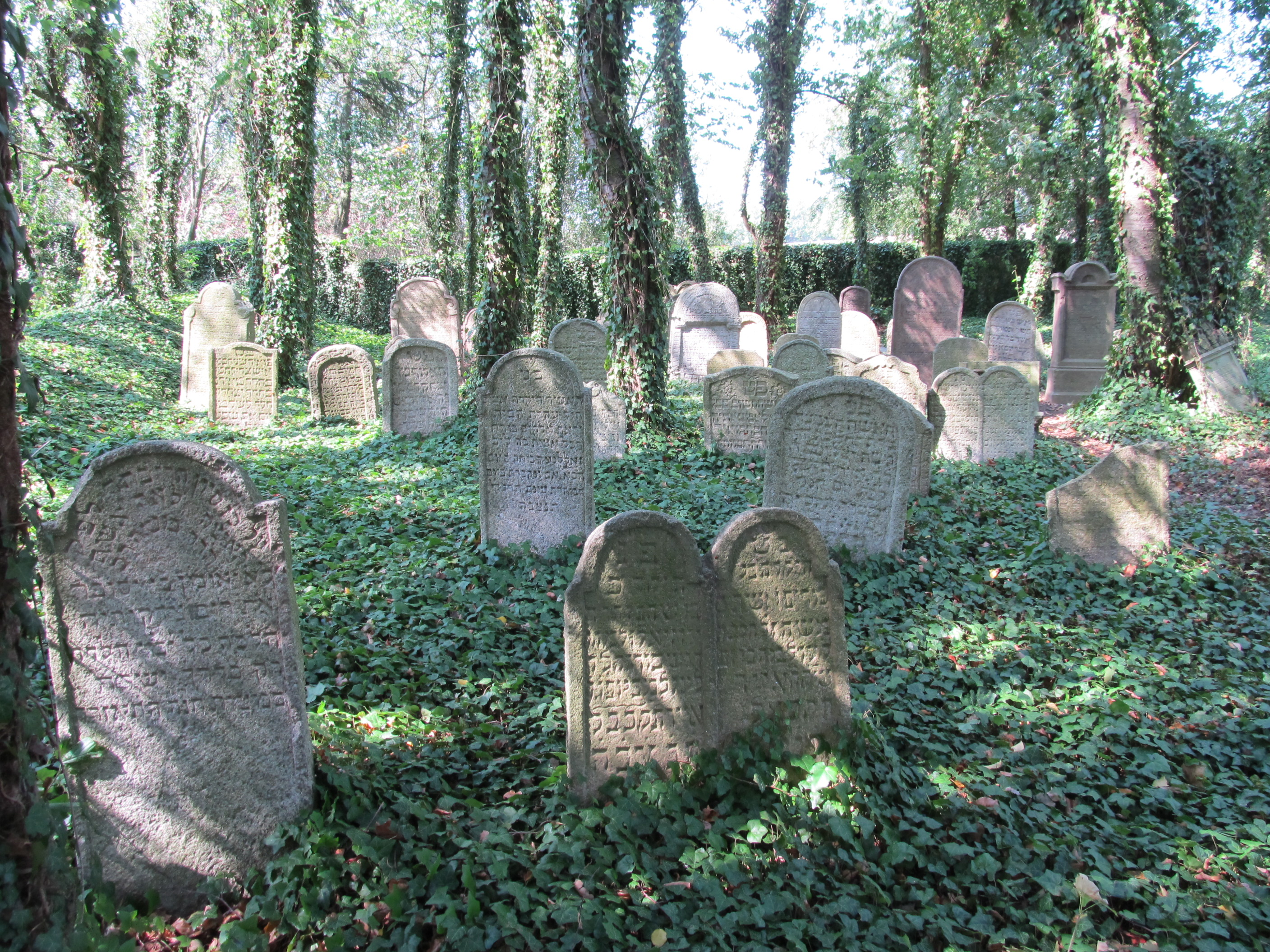 Poběžovice 08 ŽH